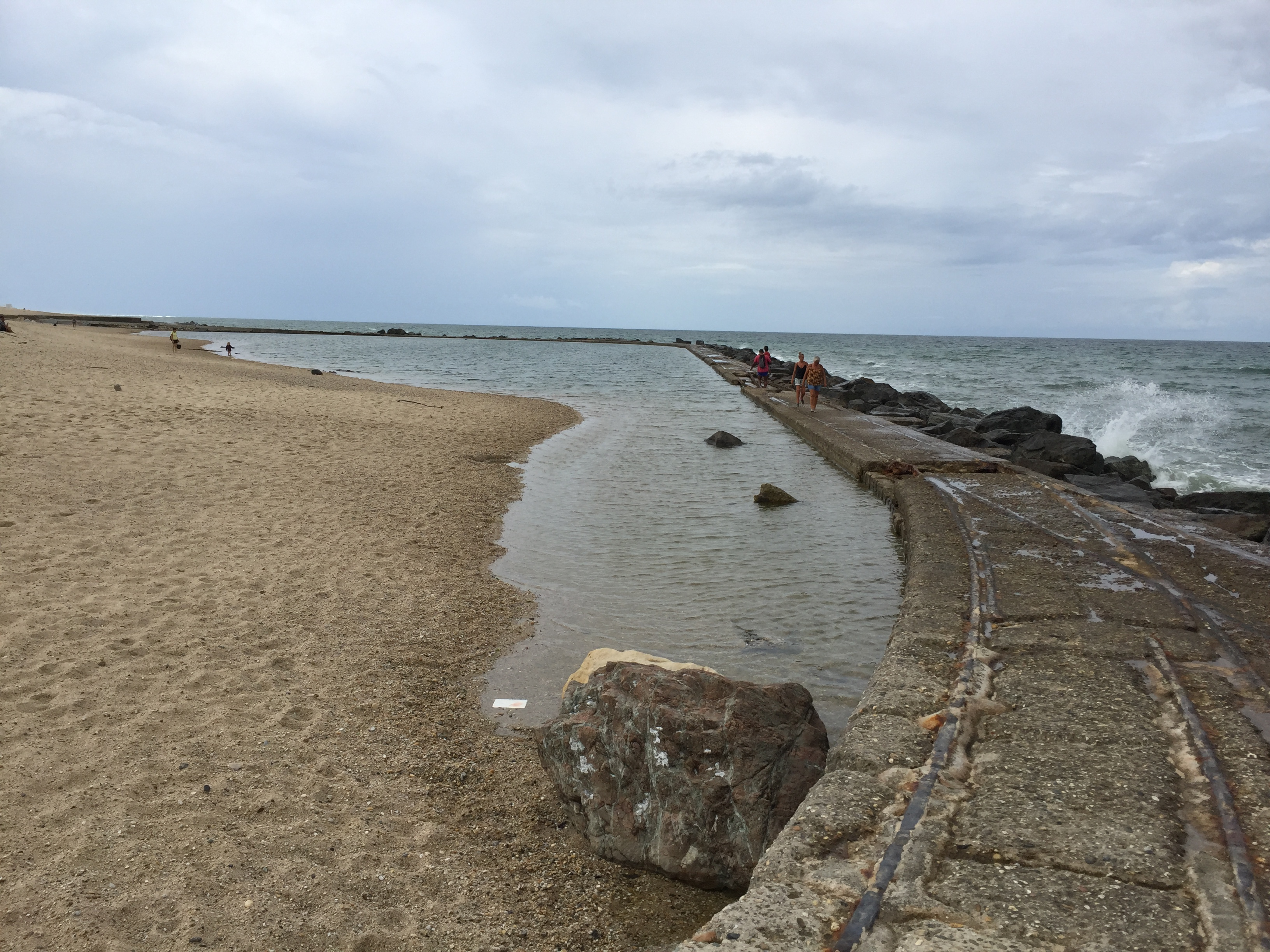 Les digues ont réapparu au nord de Soulac, plage des Arros